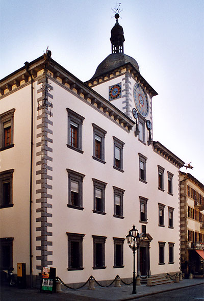 licence picswiss Rathaus von Sitten (1657-1665) mit astrologischer Uhr (63 KB - 400x590) Foto: Roland Zumbühl, Arlesheim, 11.02.02